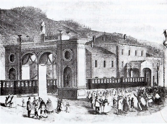 Anonymer Stahlstich von 1856. Der Bahnhof St. Gallen anlässlich der Eisenbahneröffnung am Ostermontag 1856 (Wintherthur-St.Gallen)